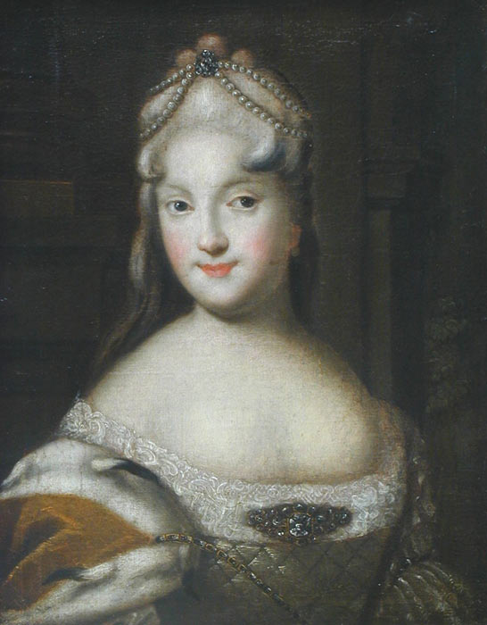 Неизвестный художник ПОРТРЕТ ЕКАТЕРИНЫ АЛЕКСЕЕВНЫ ДОЛГОРУКОЙ. 1729 г. Холст, масло, 60Х46. Из собрания Ф.М.Плюшкина. Атрибуция Н.М.Леоновой